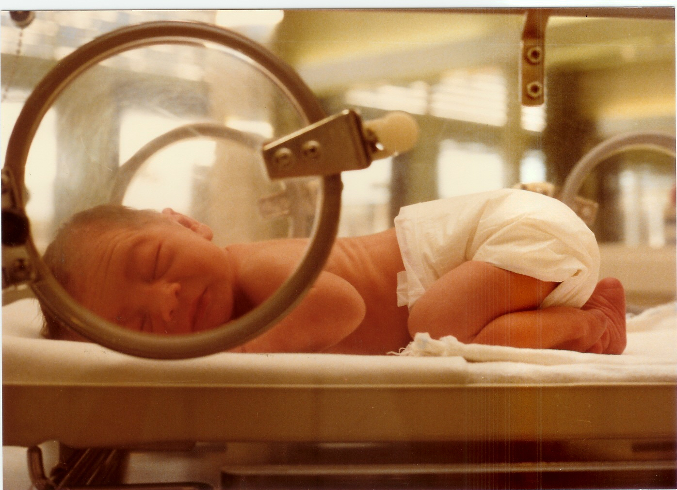 Jaap Vermeulen, Jacoplane in a Neonatal intensive care unit